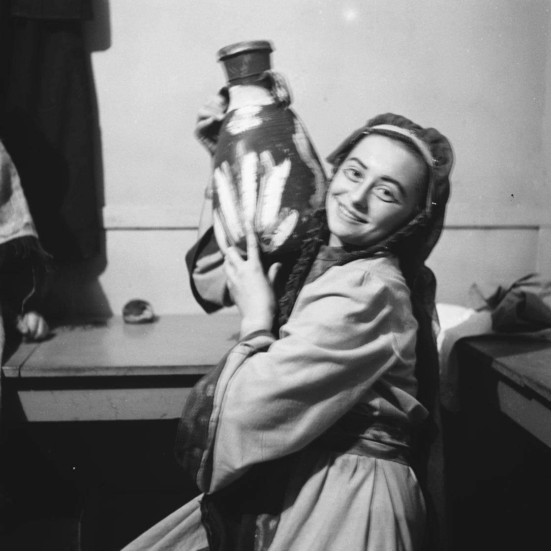 אוסף צילומים של הצלם זולטן קלוגר טווח מספרי התשלילים 25603 - 25798: 20 שנה לקיבוץ מעברות - הצגת "שיר השירים"